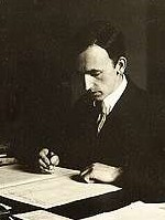 Cuno Hoffmeister während der Arbeit an der Sternwarte in Bamberg (1915 - 1918), Public domain